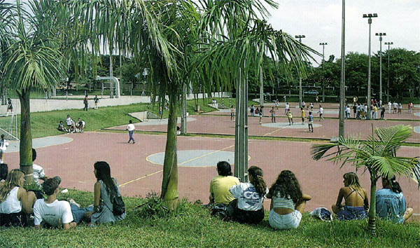 Vista da Faculdade de Educação Física - UNICAMP